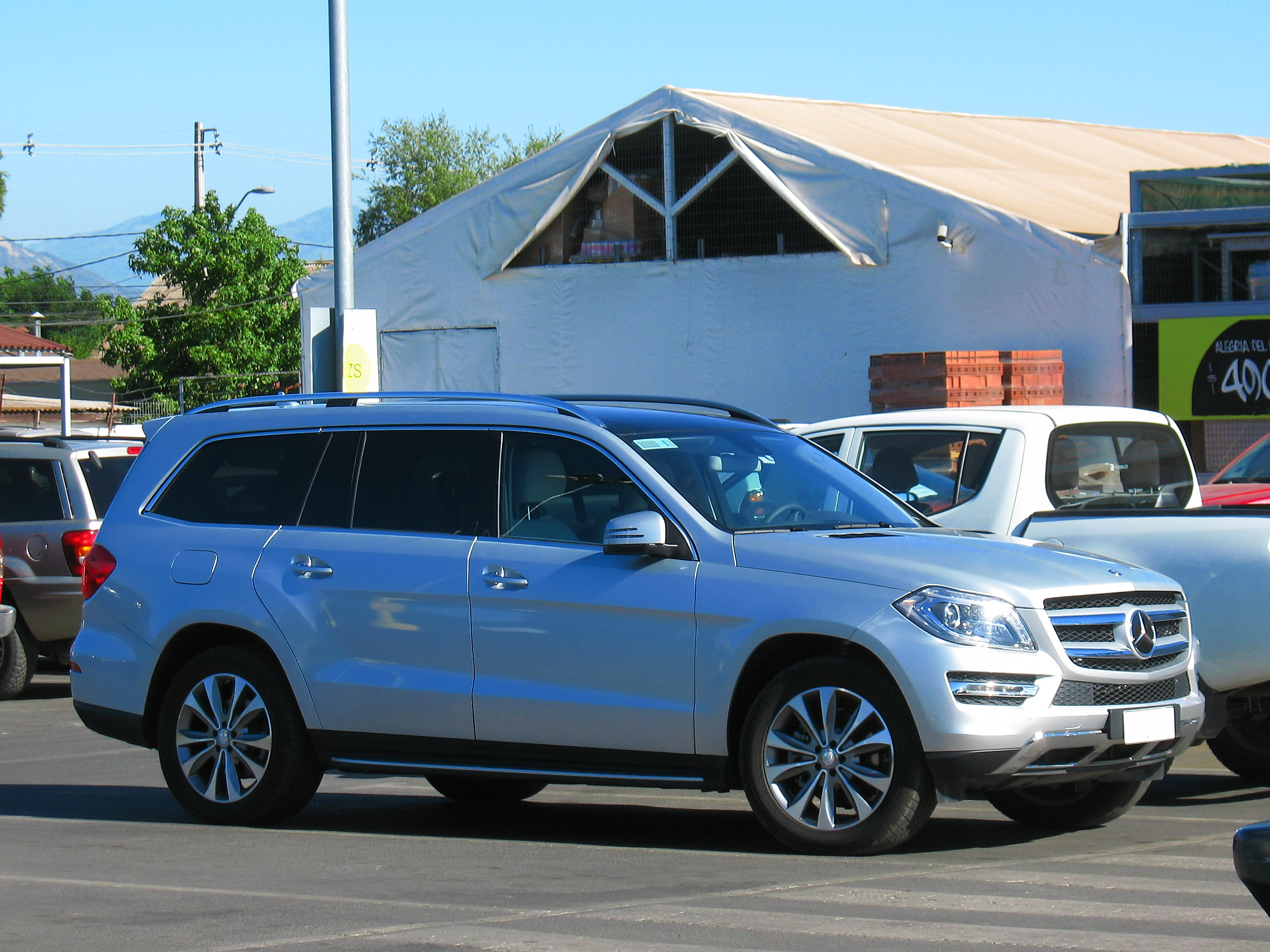 Mercedes Benz GL 350 Bluetec 2014